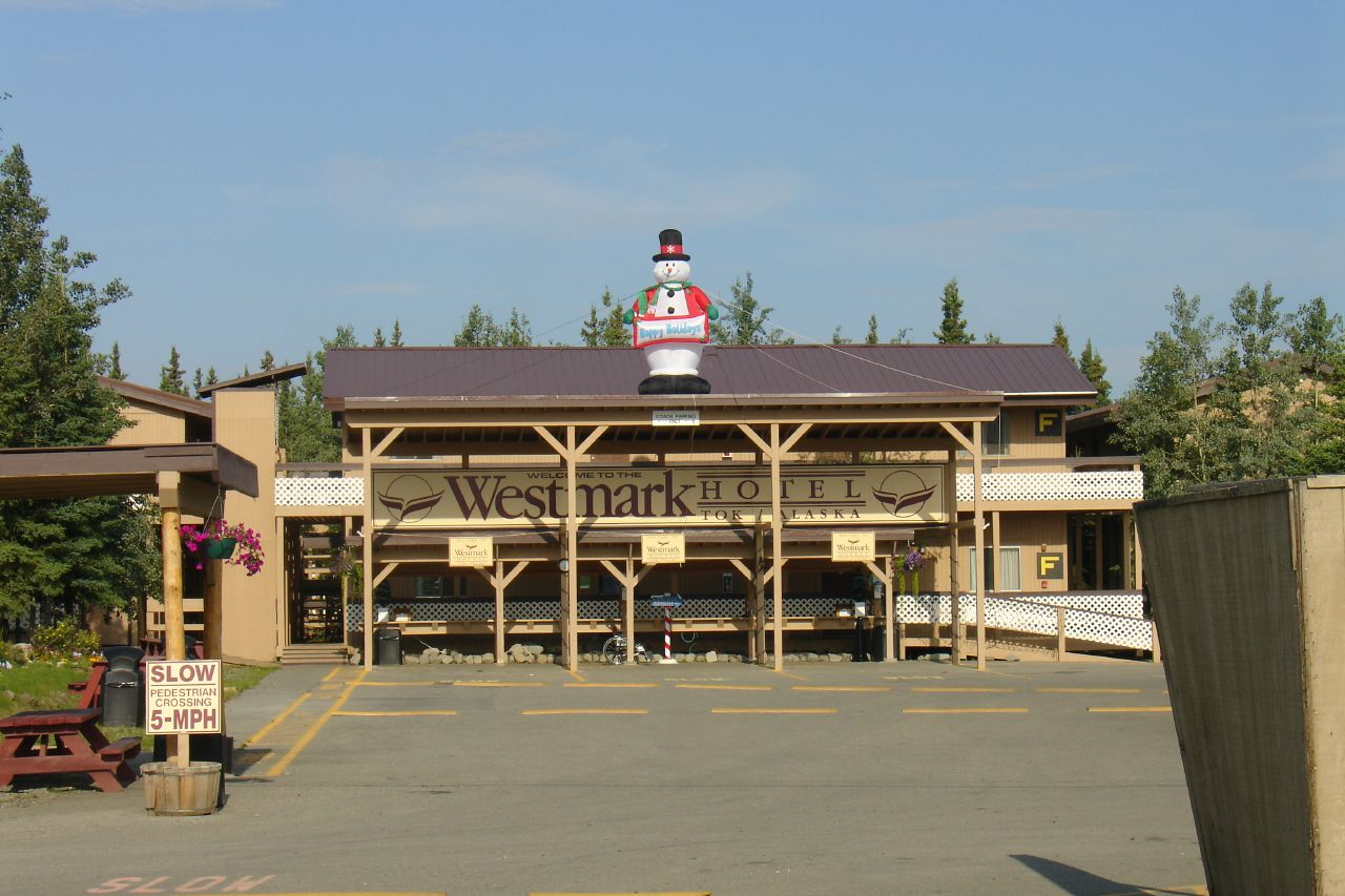 Tok, Alaska